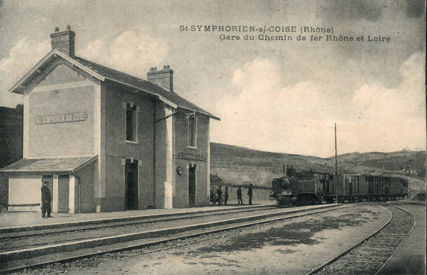 Carte postale ancienne éditée par Delau à l'Arbresle : SAINT-SYMPHORIEN-SUR-COISE - Gare du Chemin de fer Rhône et Loire